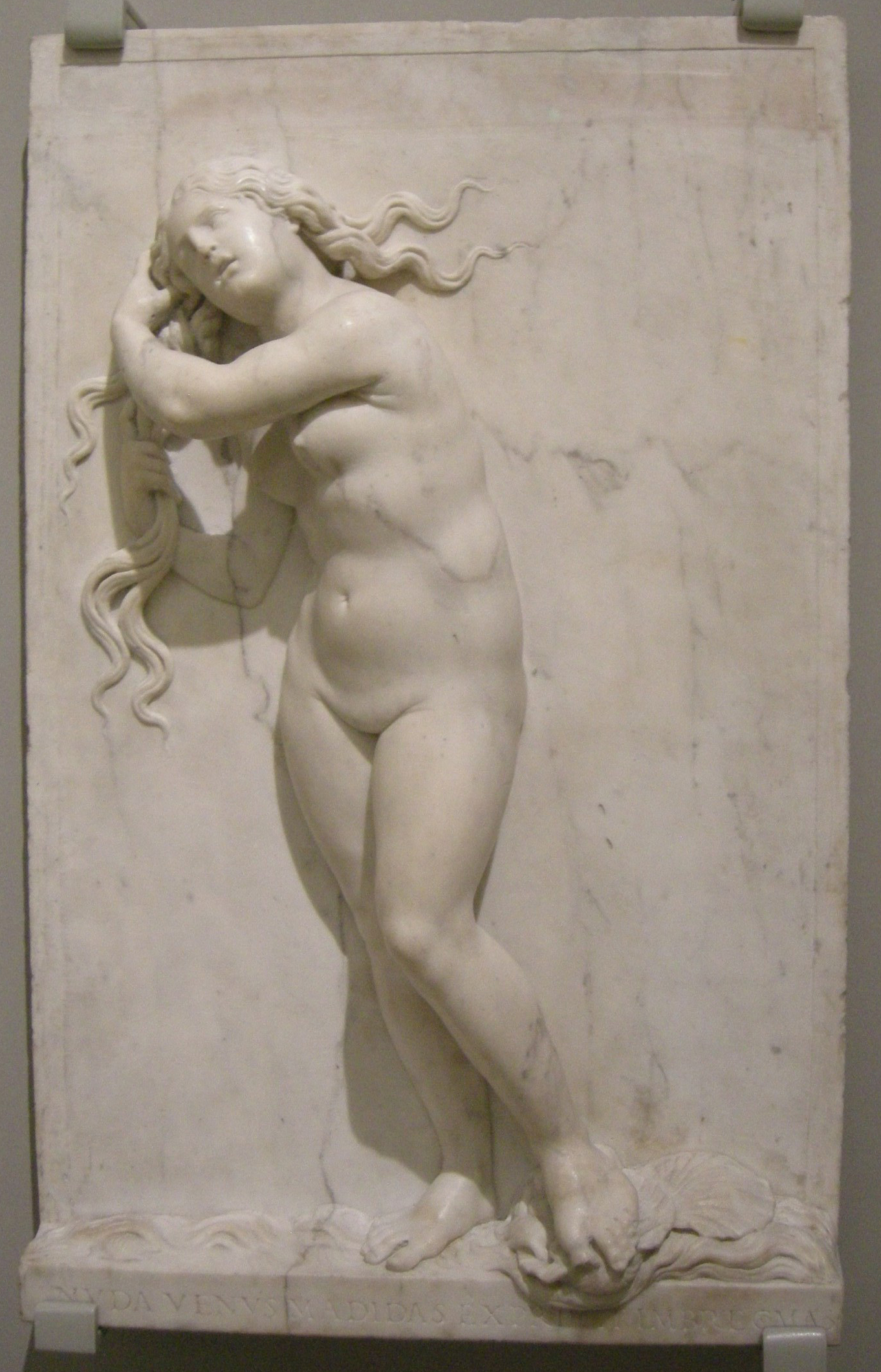 Antonio lombardo, venere che si pettina, 1510-15 circa